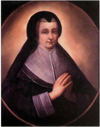 Portrait de Madeleine de la Peltrie